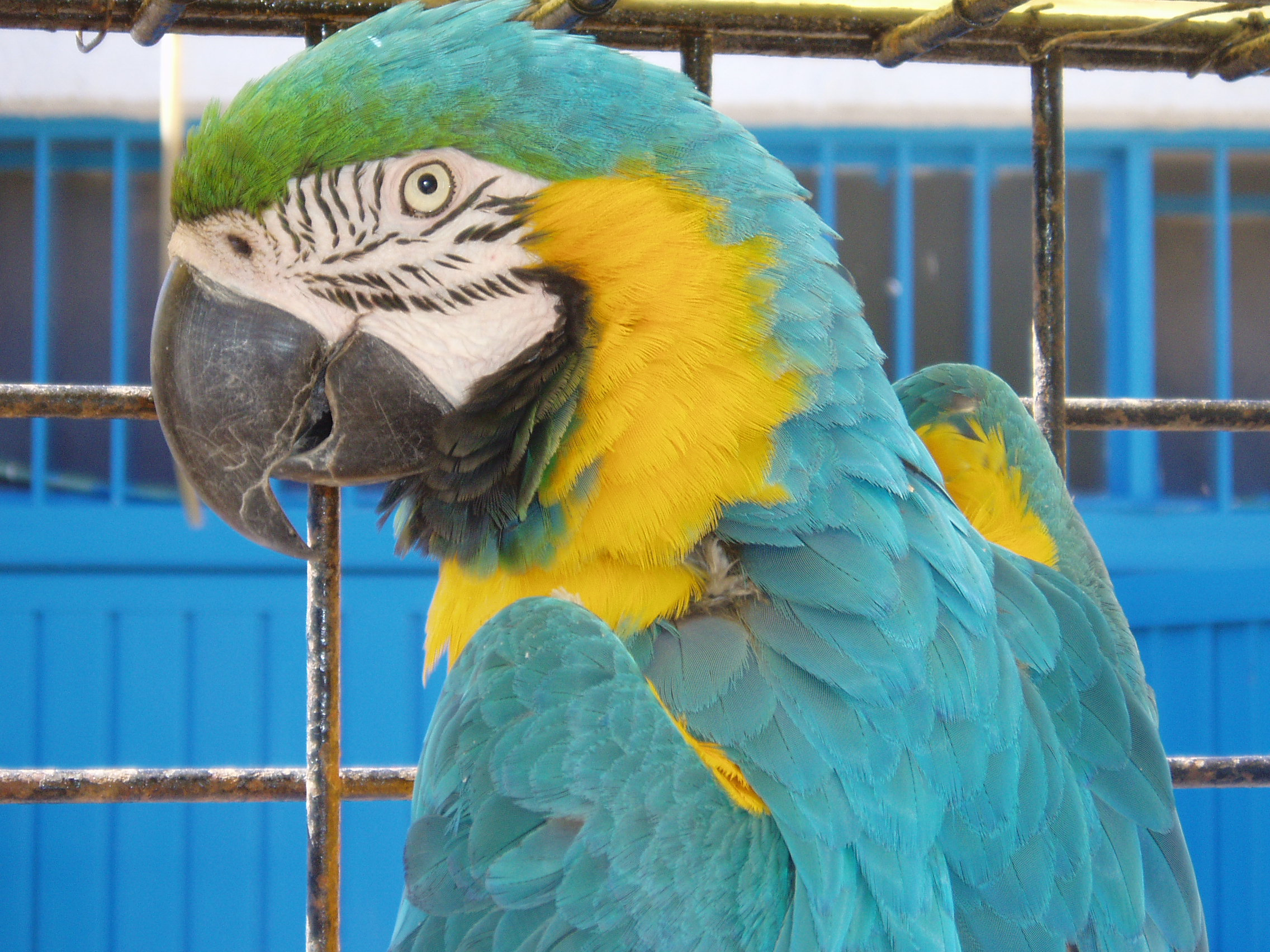 Porträt eines Papageis